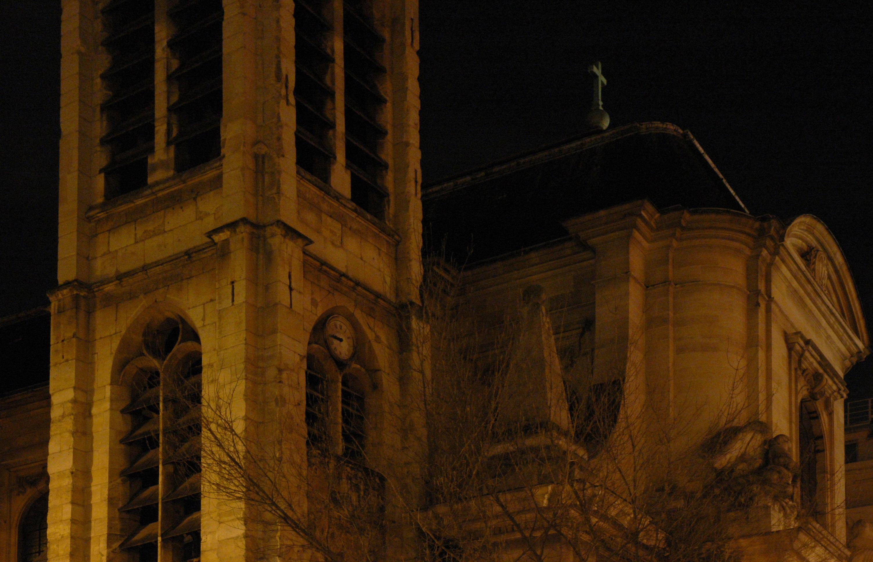 Église Saint-Nicolas-du-Chardonnet à Paris